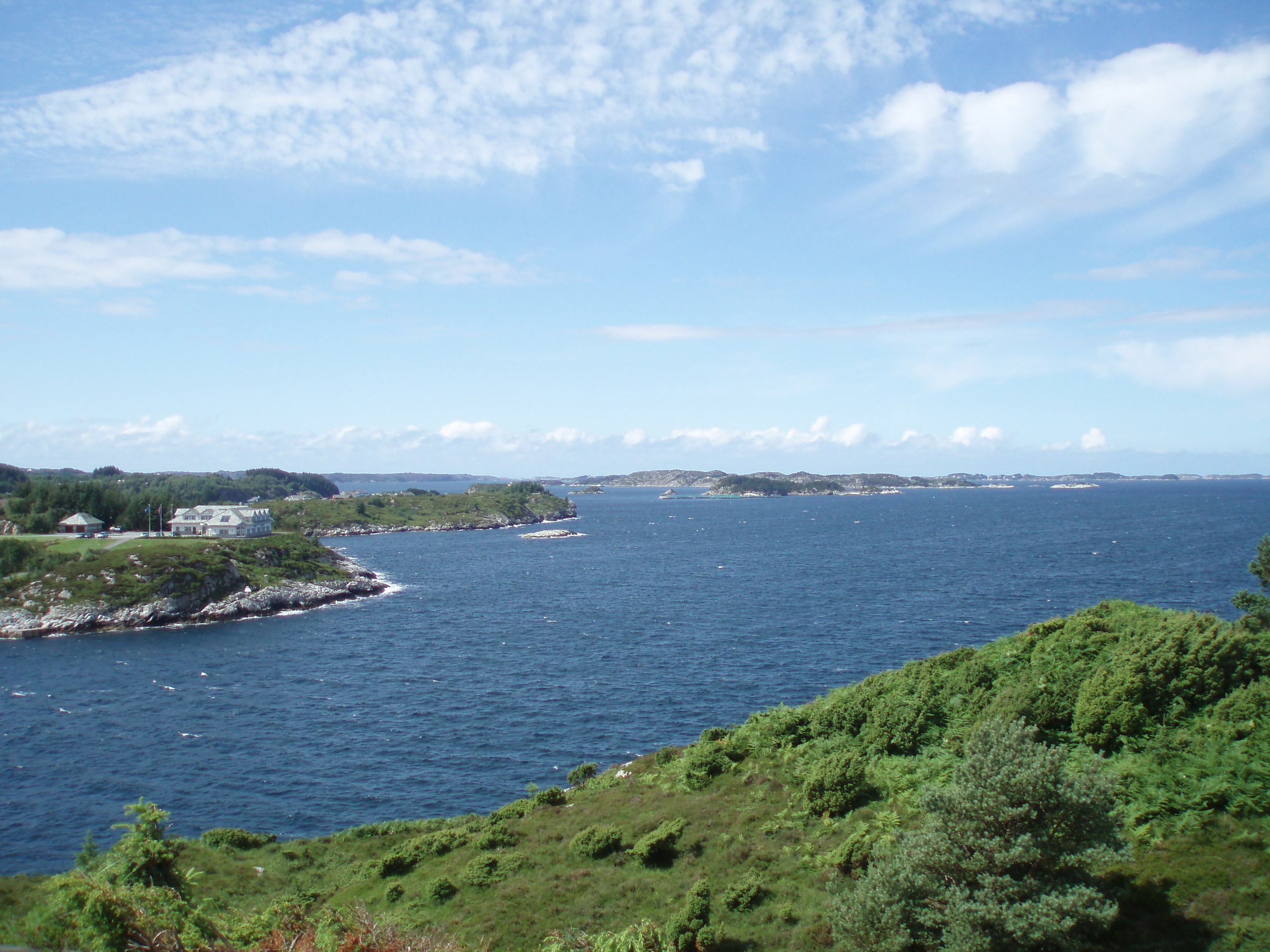 Bekkjarviksundet between Huftarøy and Selbjørn in Austevoll, Hordaland, Norway. Møkstrafjorden seen to the left.